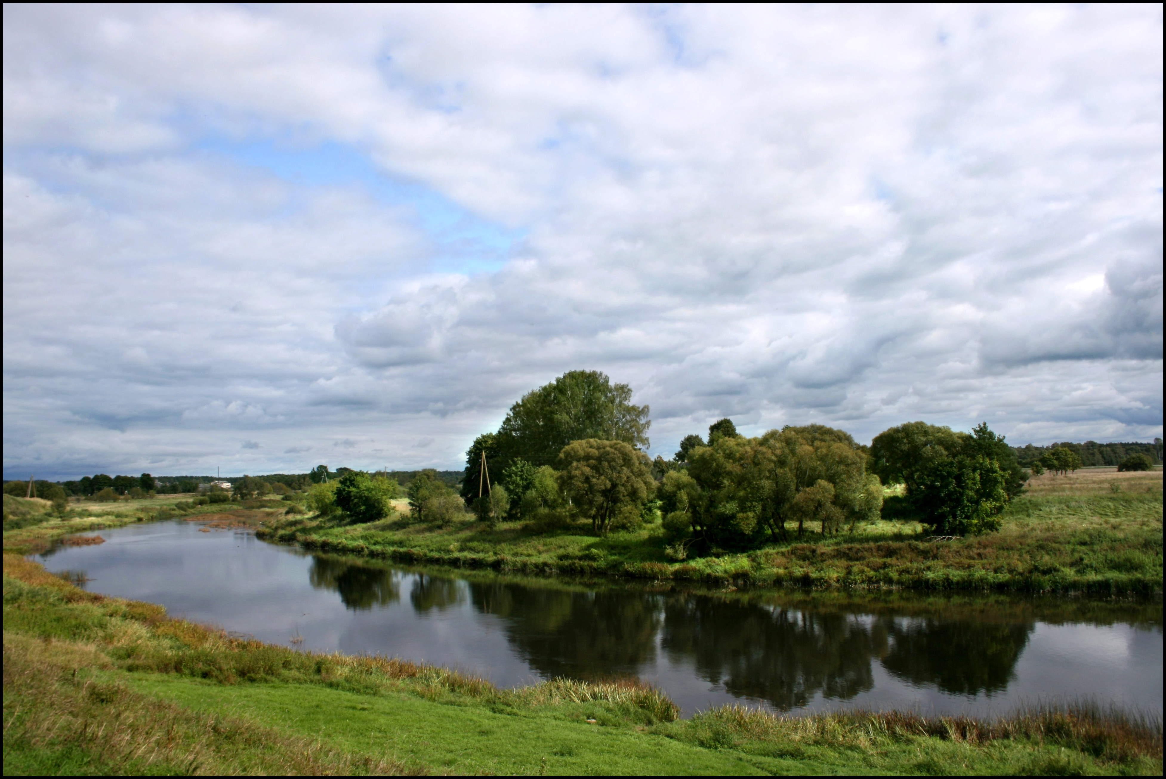 River Venta in Skrunda